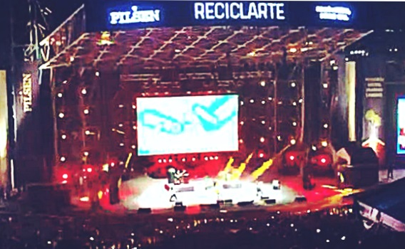 La banda de rock paraguayo en el festival Reciclarte 2020 en San Bernardino, Paraguay